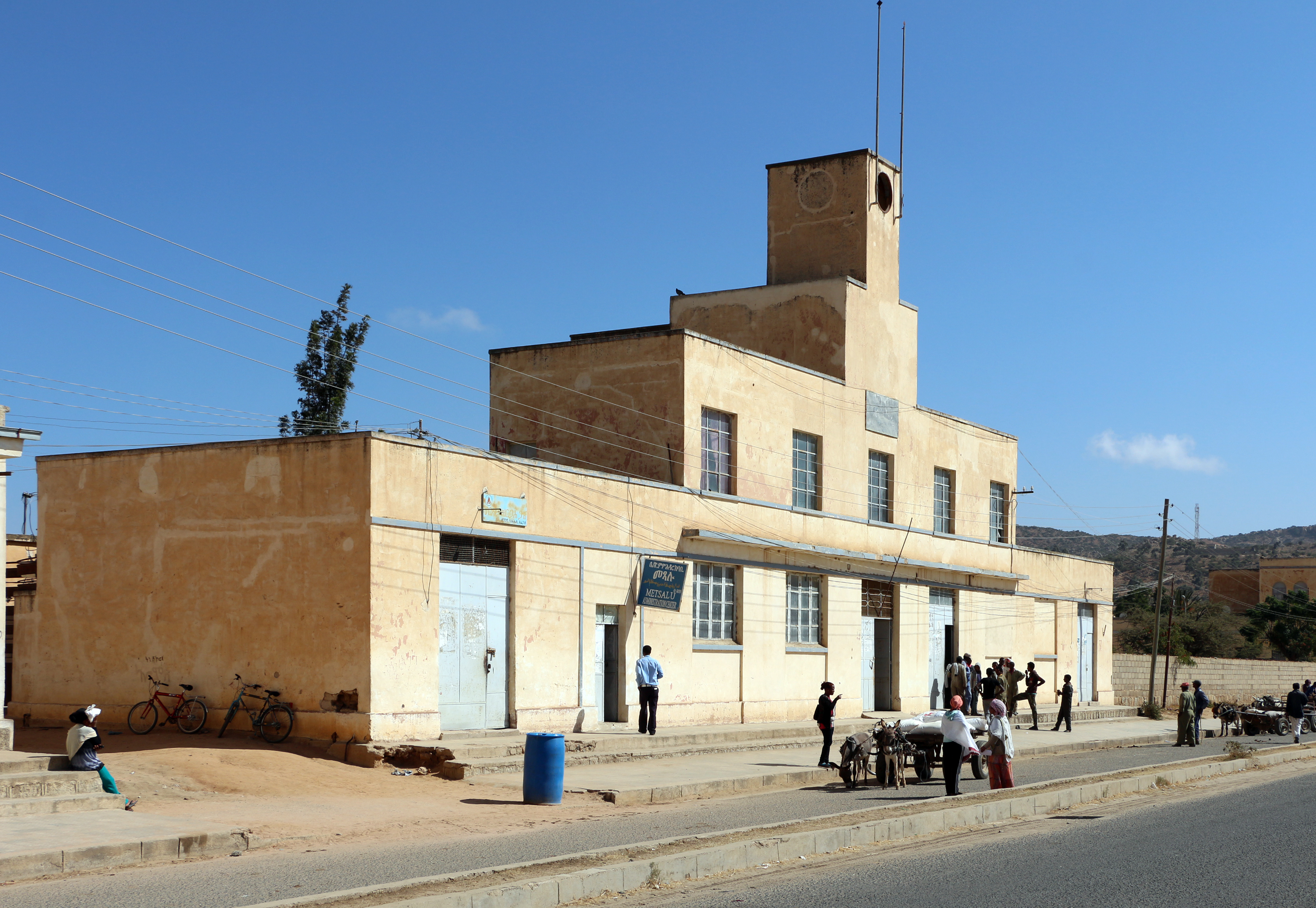 Dekemhare, strada principale 08.JPG